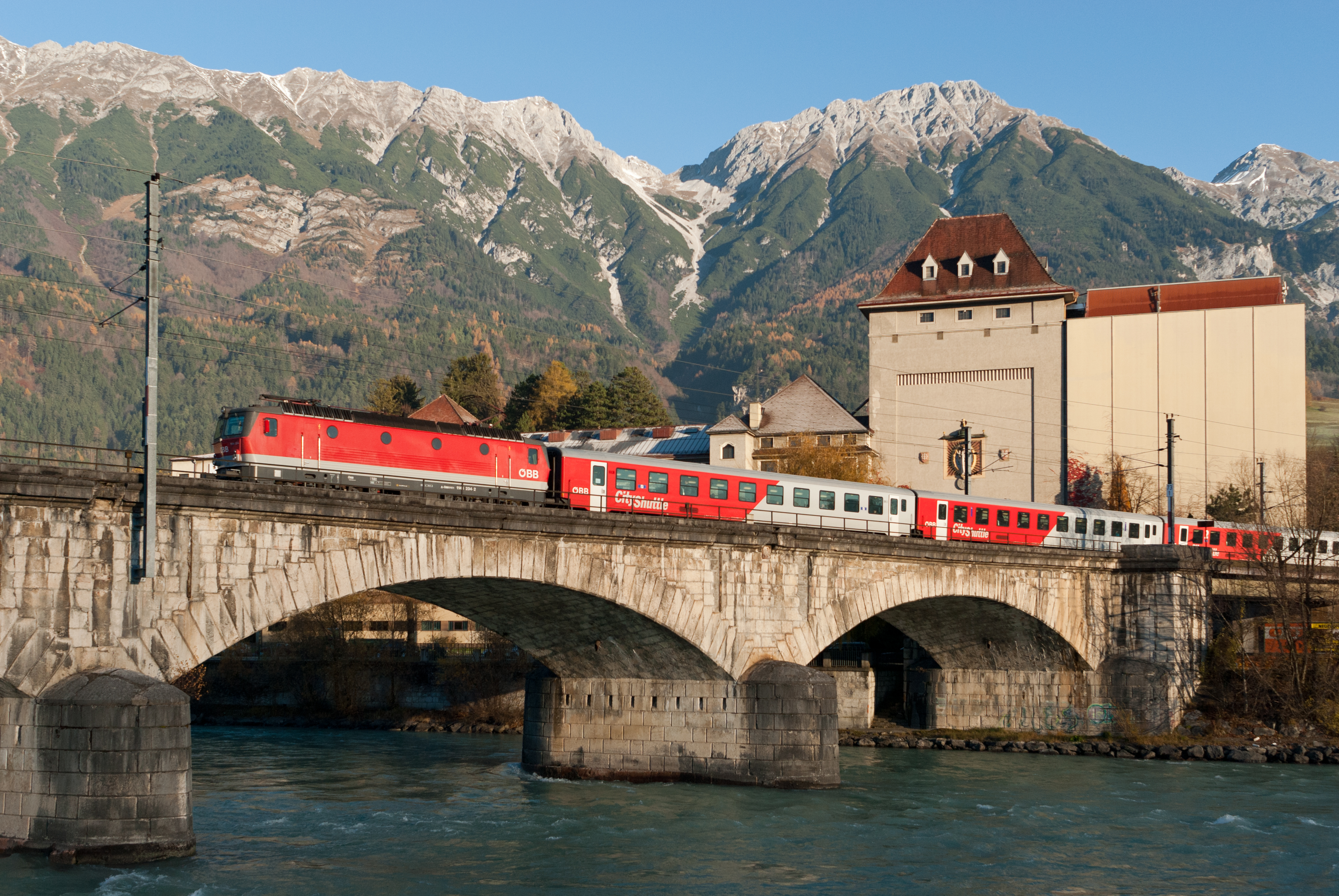 Mühlauer Eisenbahnbrücke